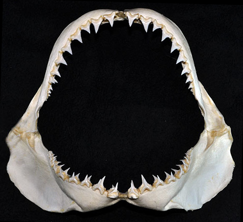 Carcharodon carcharias juvenile